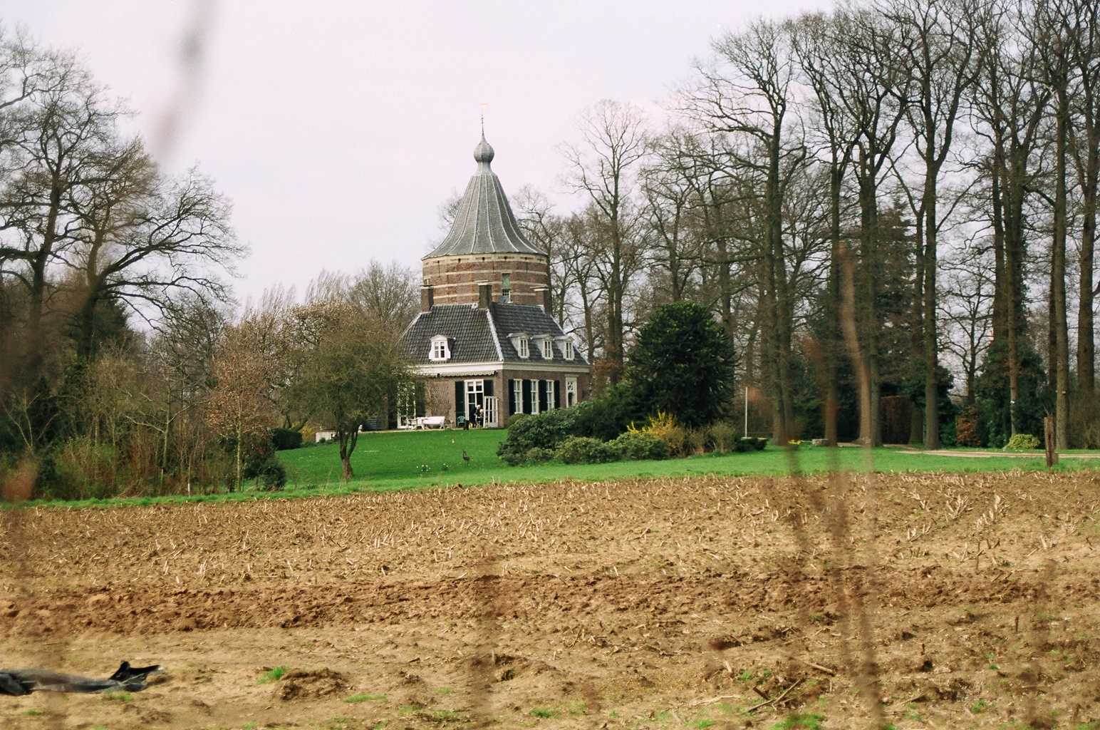 eigen werk